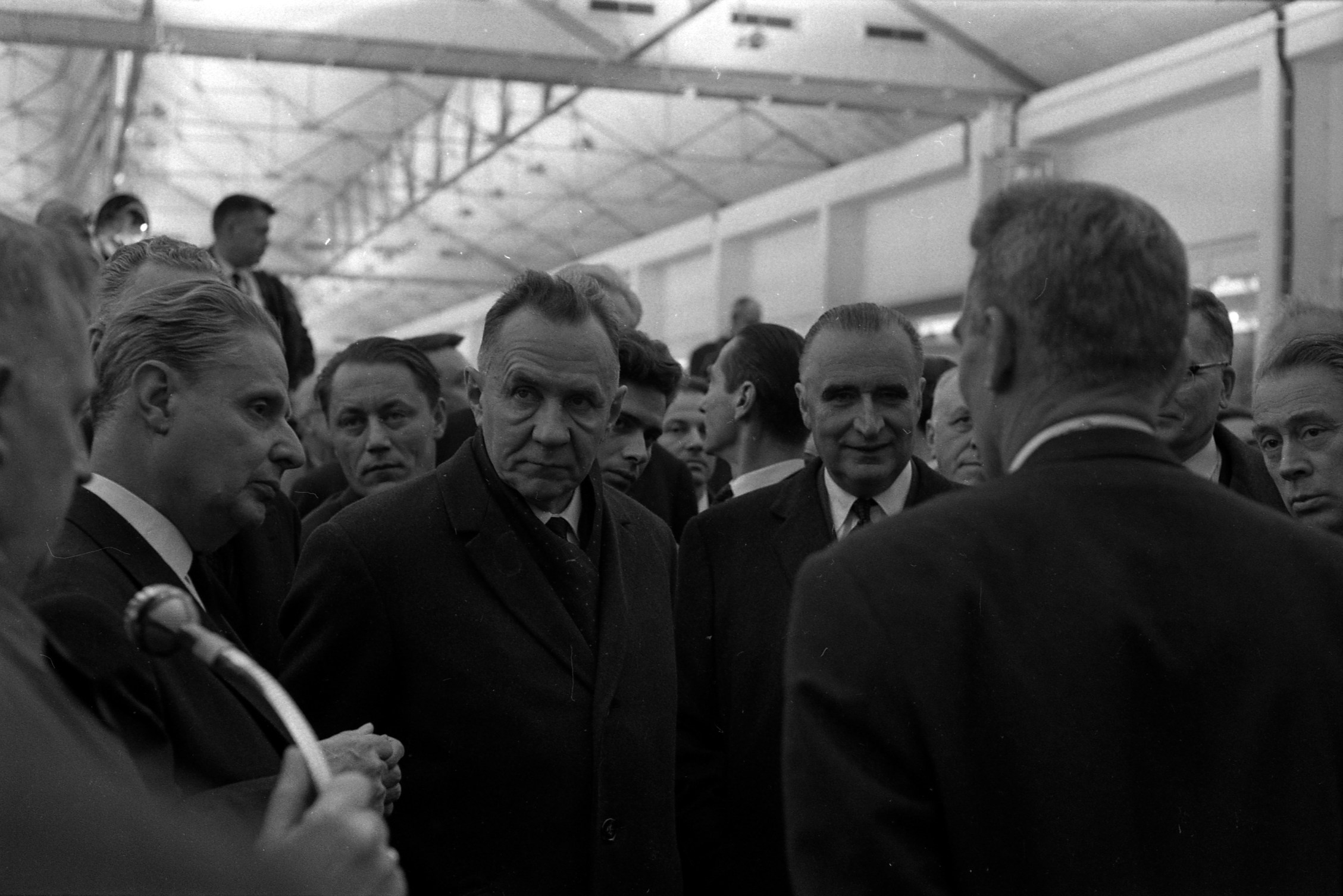 Pas de lieu. Le 5 Novembre 1966. Vue de Georges Pompidou et d'Alexis Kossyguine en visite dans une entreprise.